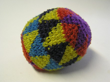 Häckisäck